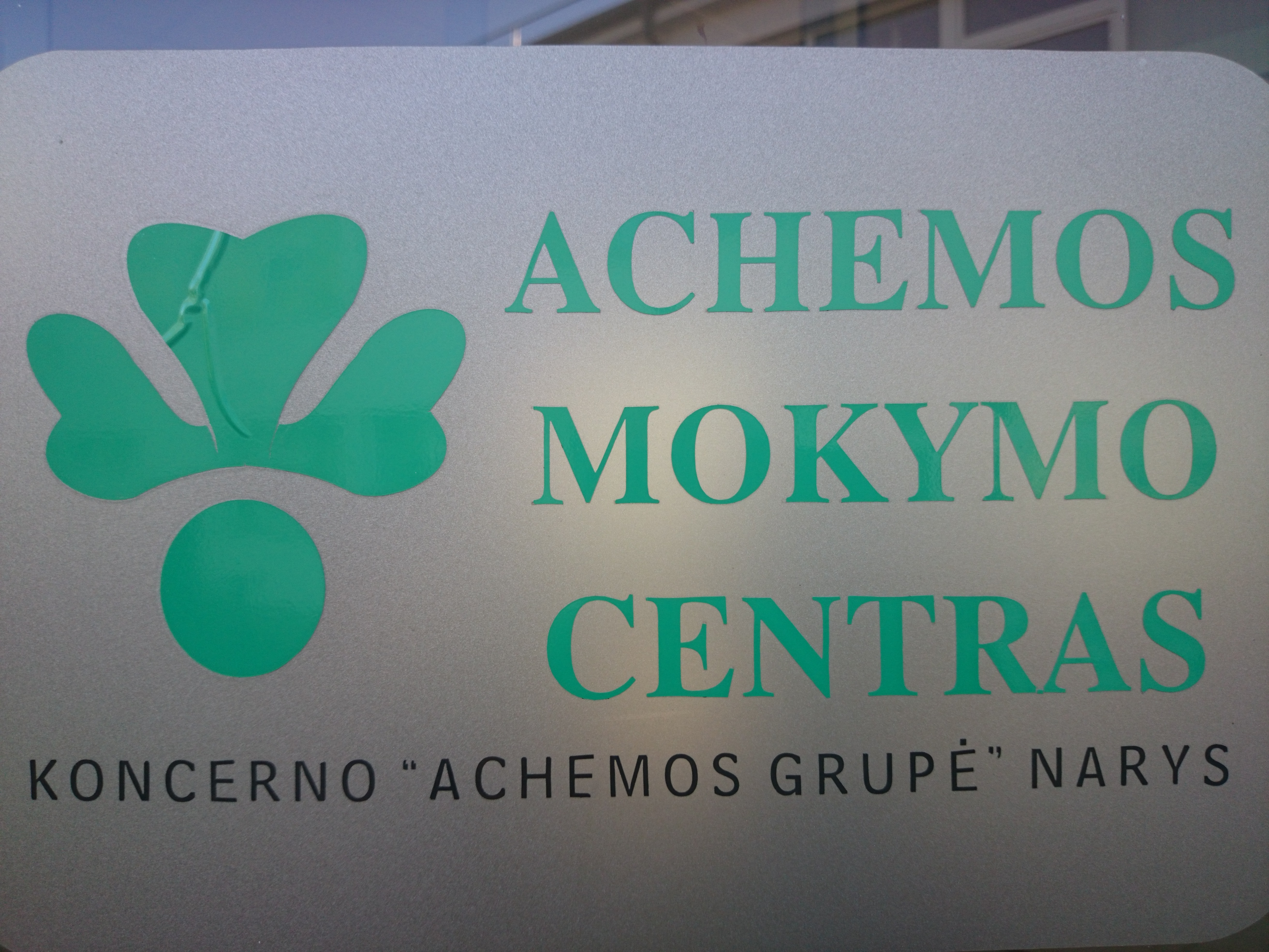 AchMC Jonava